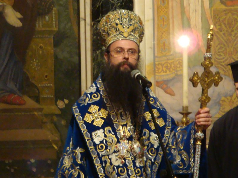 Негово Високопреосвещенство Пловдивски митрополит Николай проповядва в края на светата литургия по случай храмовия празник на патриаршеската катедрала "Свети Александър Невски" в София